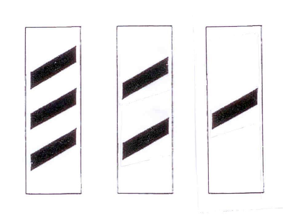 Signaux de chemin de fer "mirlitons". Le nom vient du mirliton.